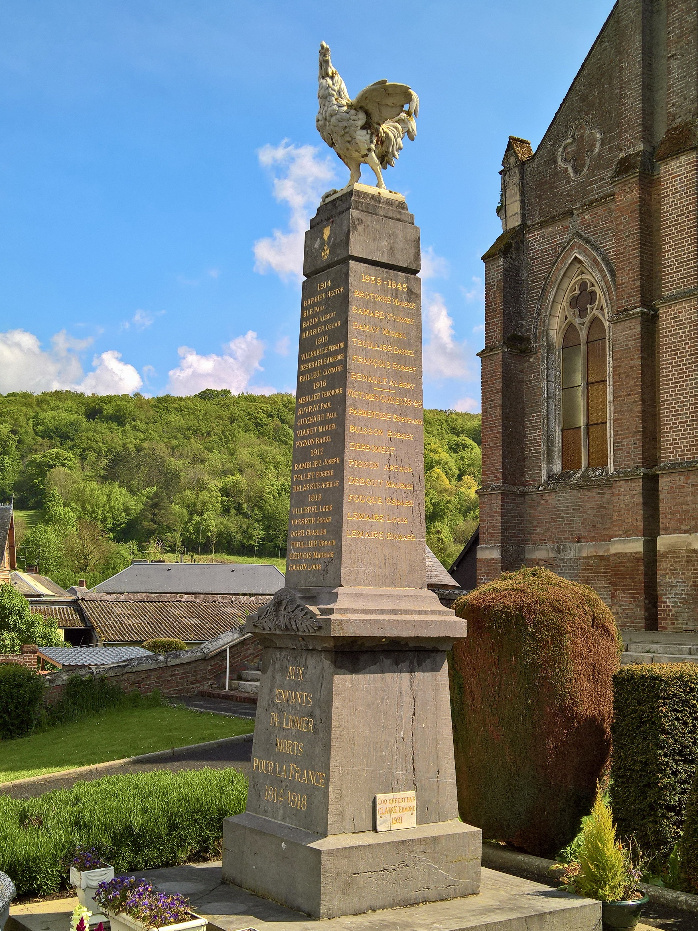 Liomer : Monument aux morts